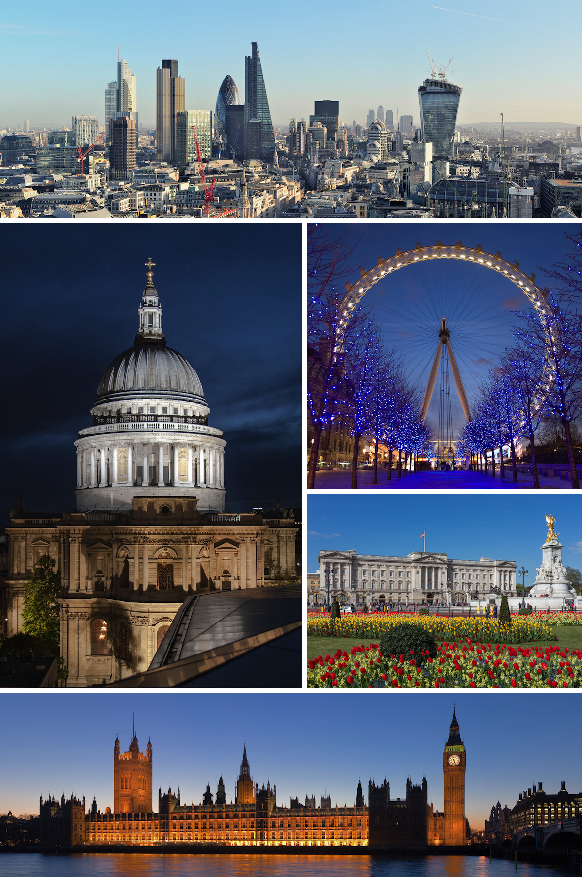 London